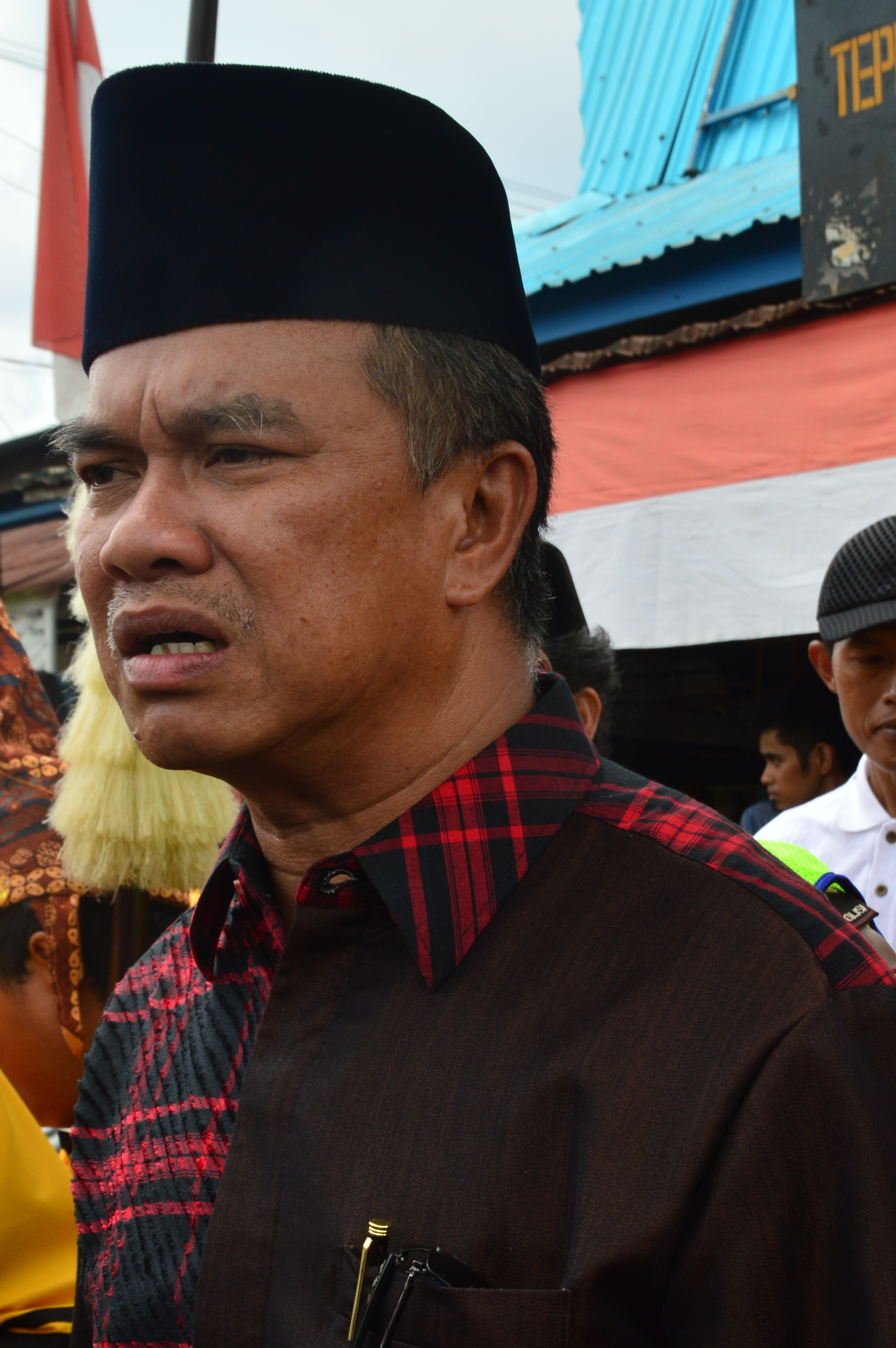 Syaharie Jaang, wali kota Samarinda periode 2010-2015 dan 2016-2021, saat hadir di acara Naga Bekenyawa pada 28 Agustus 2016.